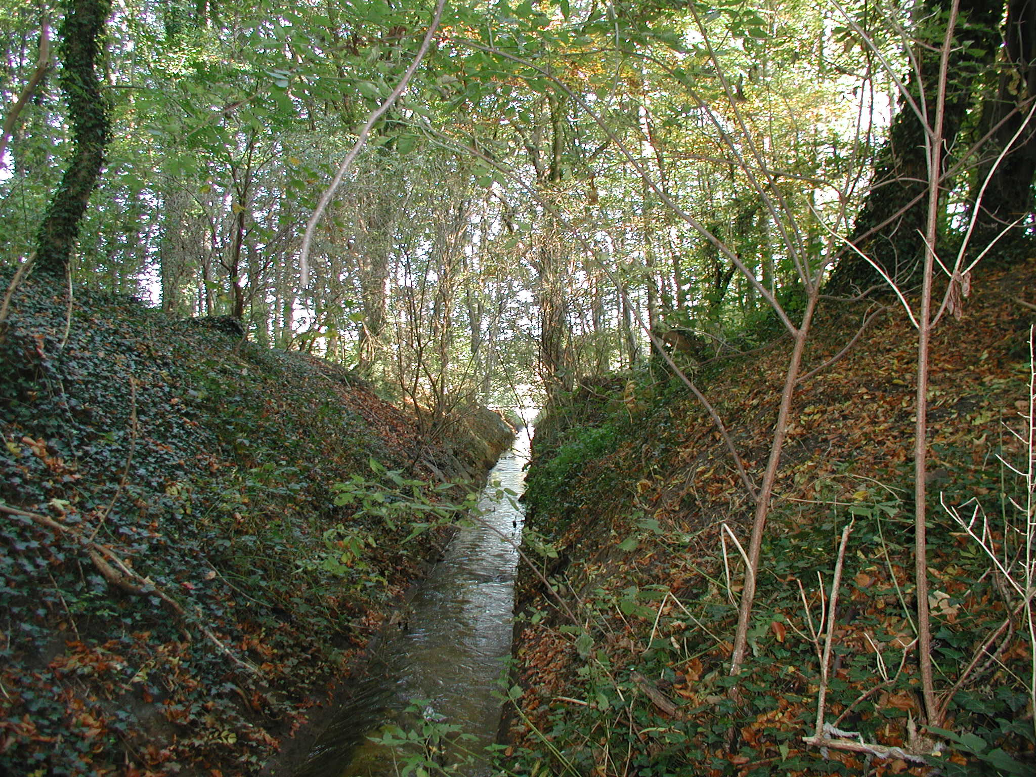 Hürth-Efferen, der kanalisierte Duffesbach (Ortsausgang)